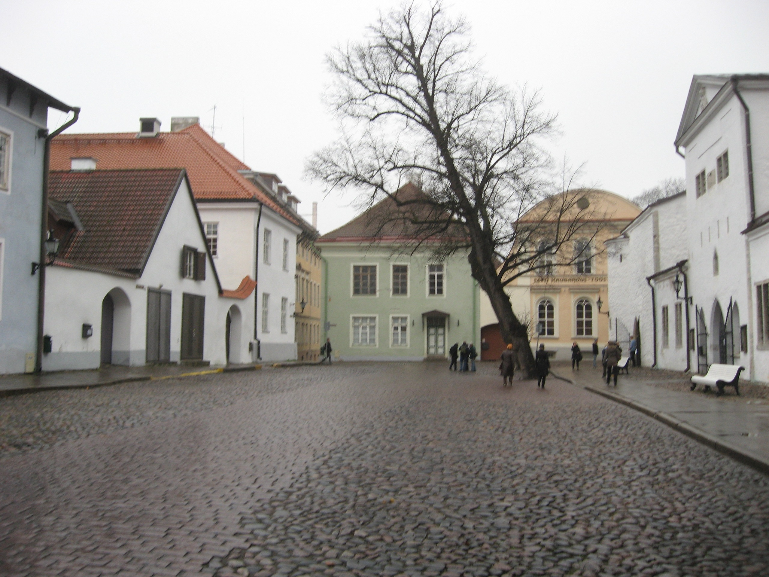 Kiriku plats